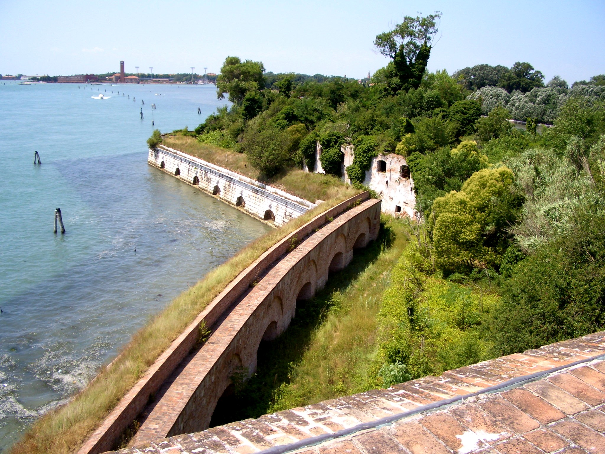 Il Forte di Sant'Andrea sull'isola delle Vignole (Venezia)